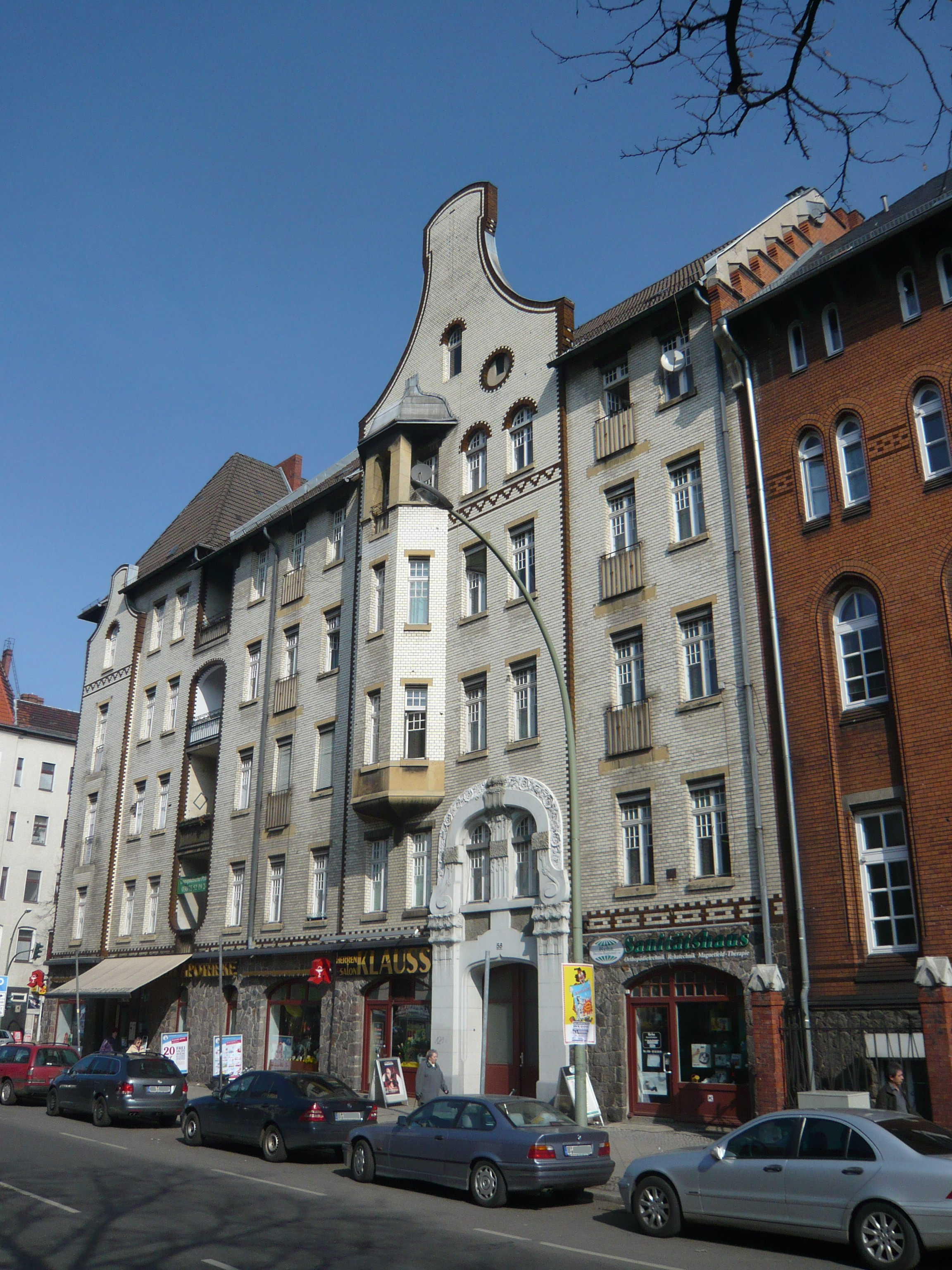 Paul-Gerhardt-Stift Berlin